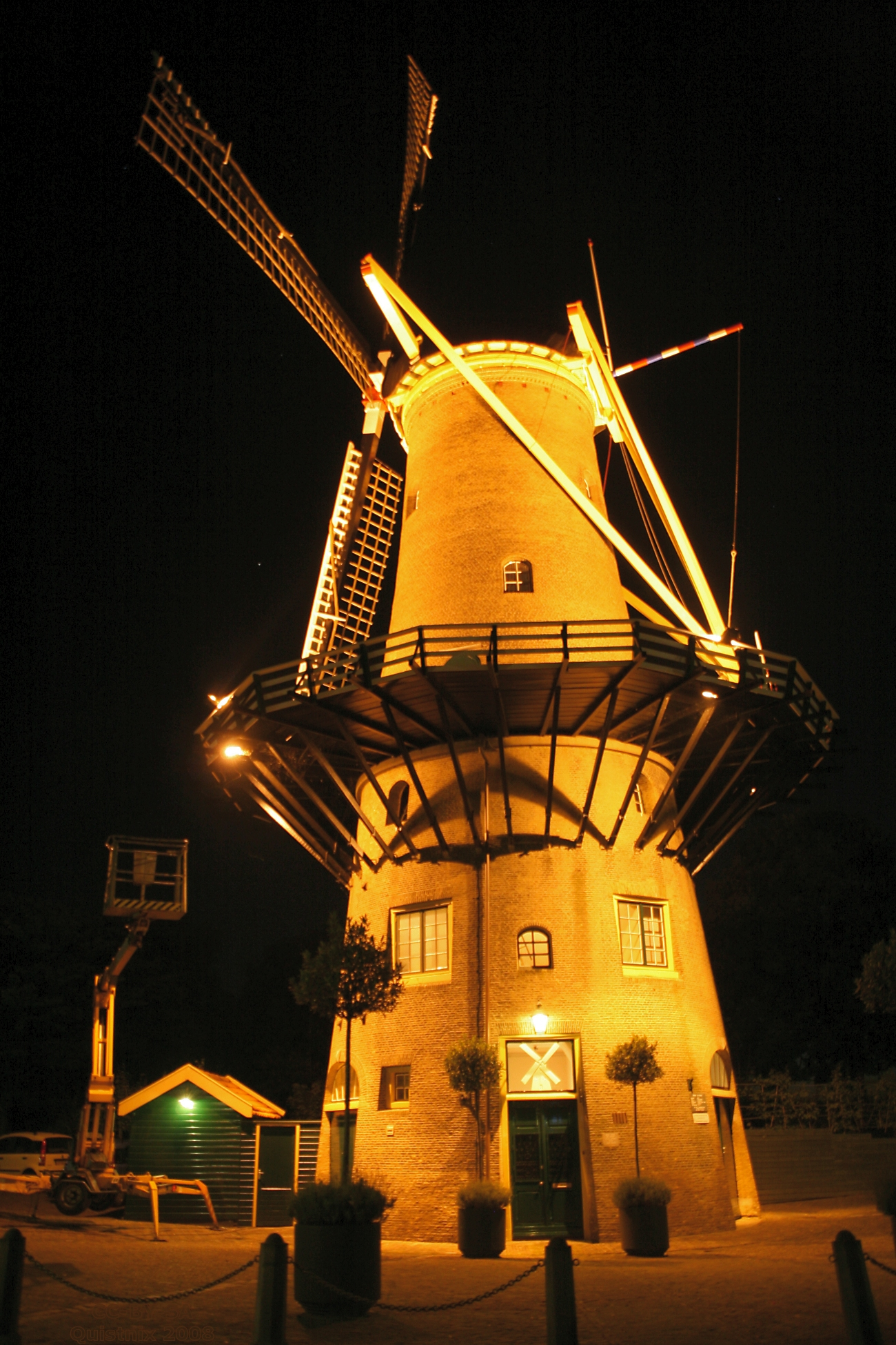 Hellevoetsluis: molen De Hoop bij nacht